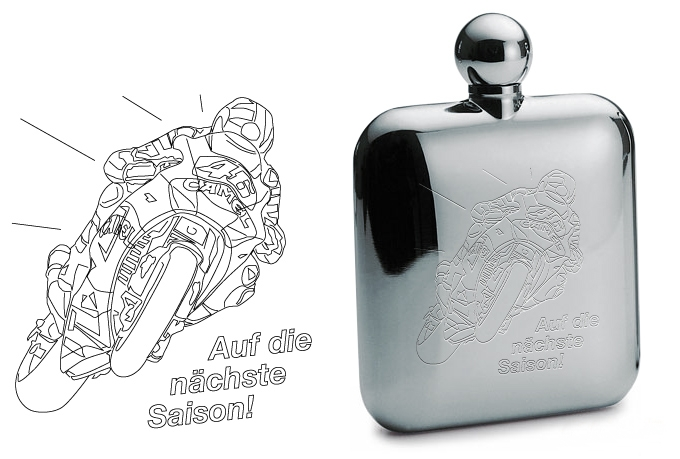 Vektordaten Gravur Beispiel auf der Edelstahl Oberfläche eines Flachmanns